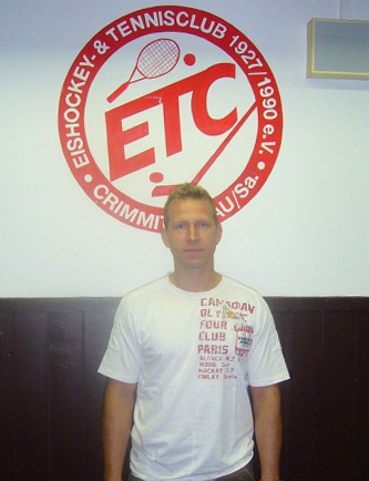 Torsten Heine